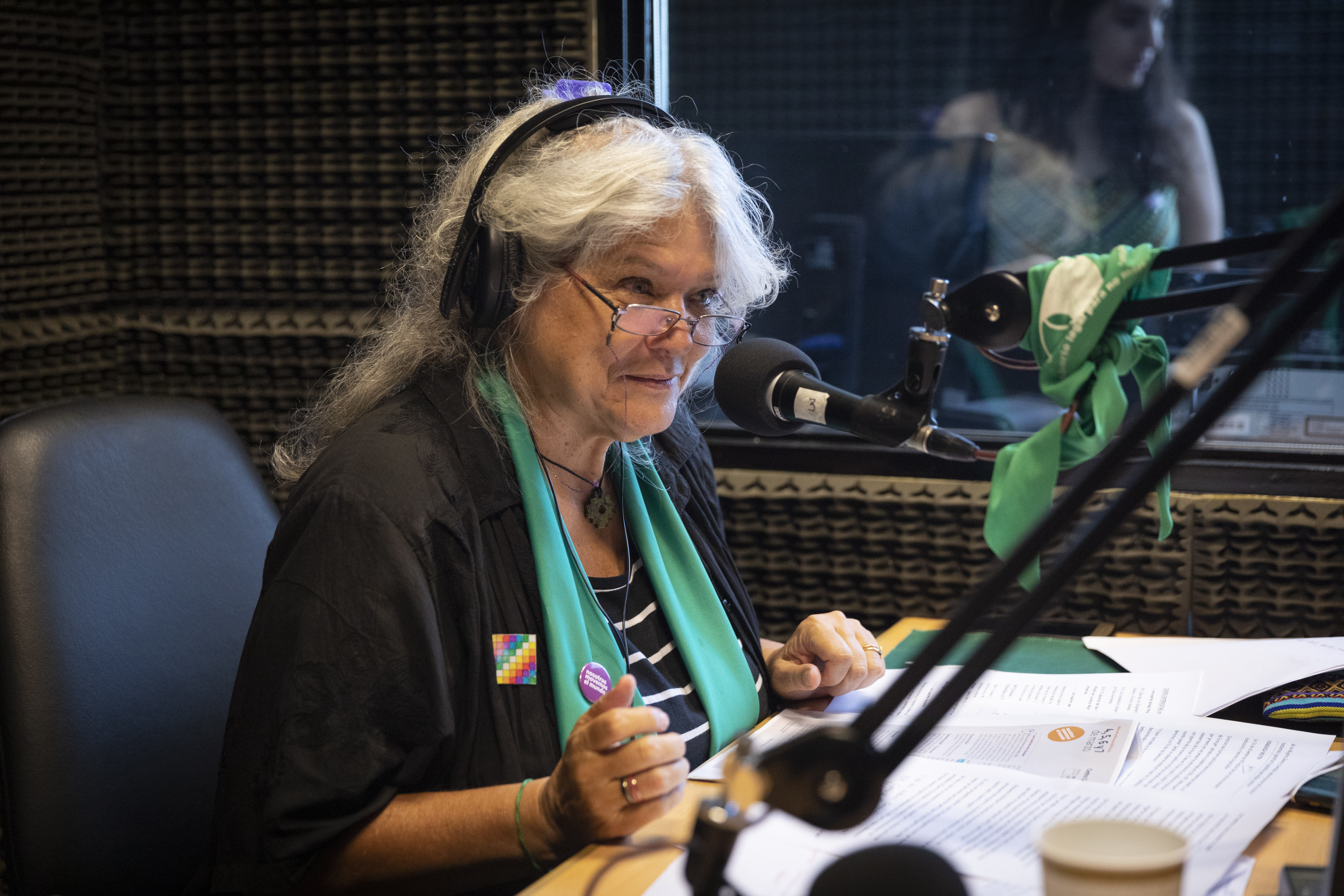 Liliana Daunes en el espacio de radio durante el evento "Nosotras Movemos el Mundo". Buenos Aires, Argentina, 5 de marzo de 2020. Centro Cultural Kirchner.